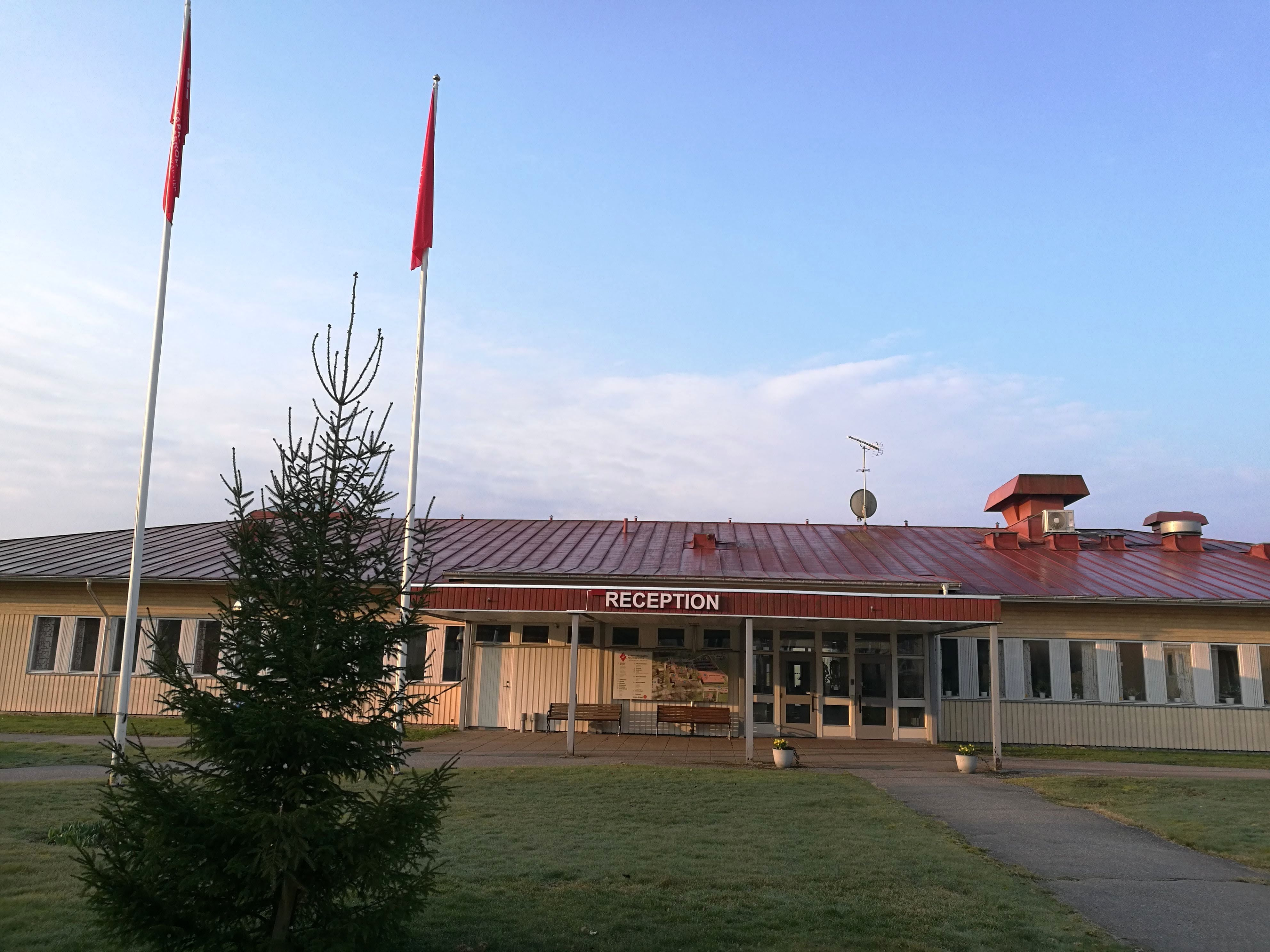 Gult hus, reception, folkhögskola, kursgård. Viskadalen, Seglora.